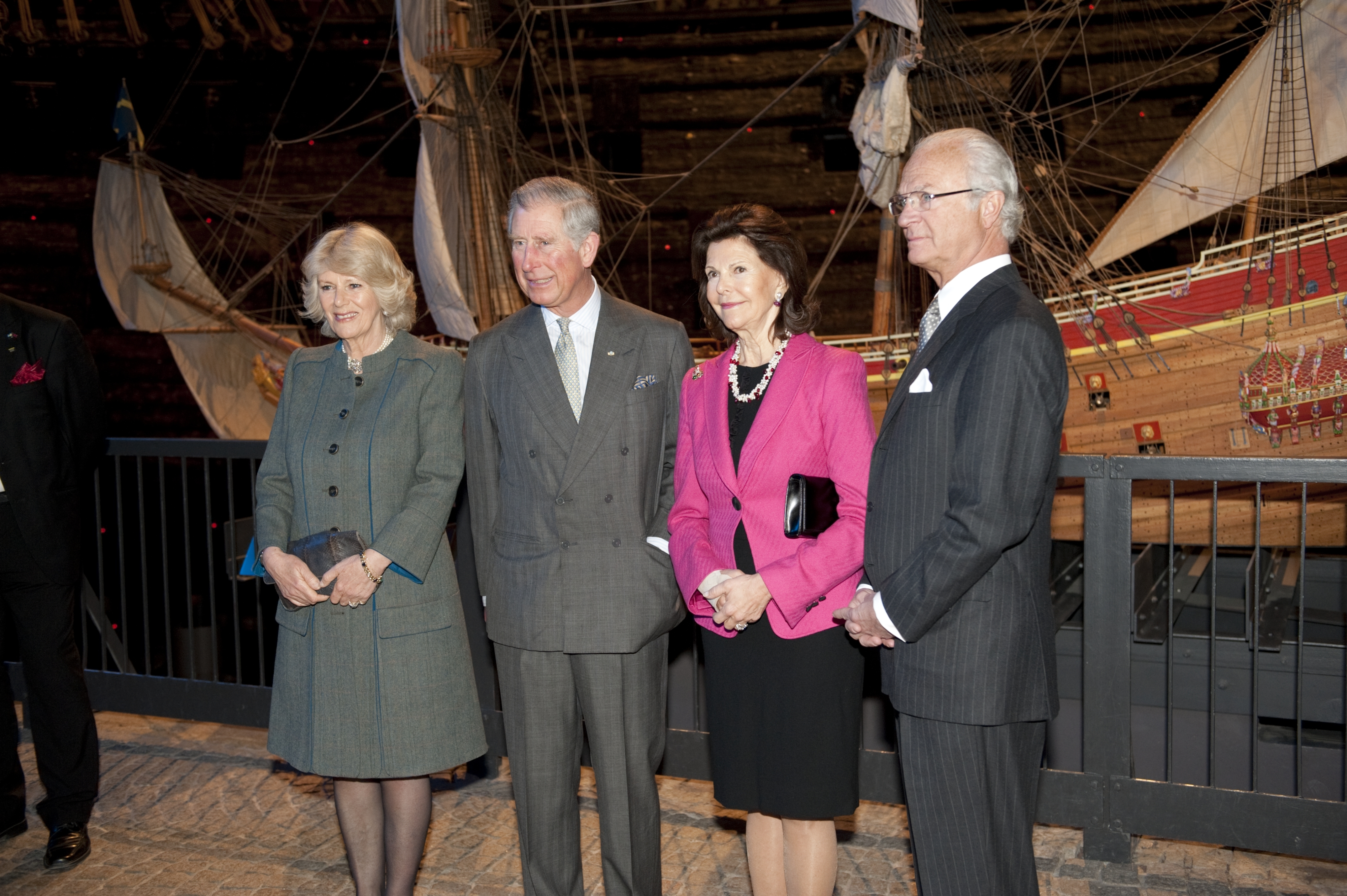 Kung Carl XVI Gustaf och Drottning Silvia besöker Vasamuseet, tillsammans med Charles, Prins av Wales och Camilla, Hertiginnan av Cornwall.